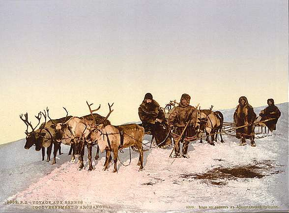 categorie:Vervoermiddel